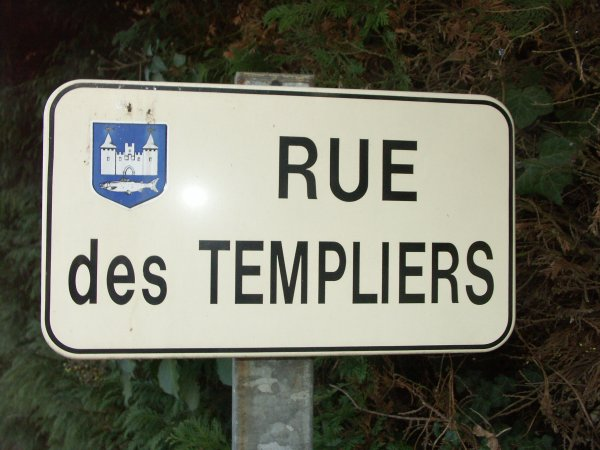 La rue des Templiers.